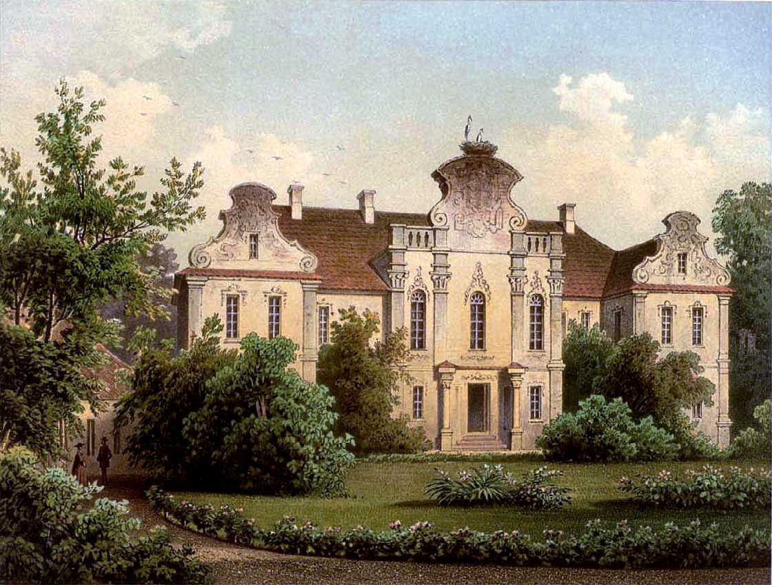 Rittergut Pinne, Kreis Samter